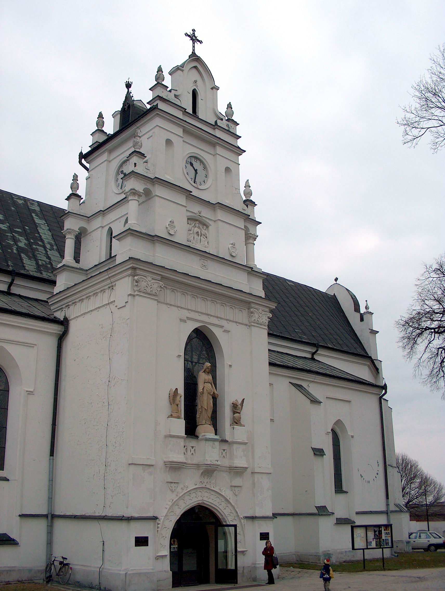 Kościół parafialny pw. WNMP w Kraśniku